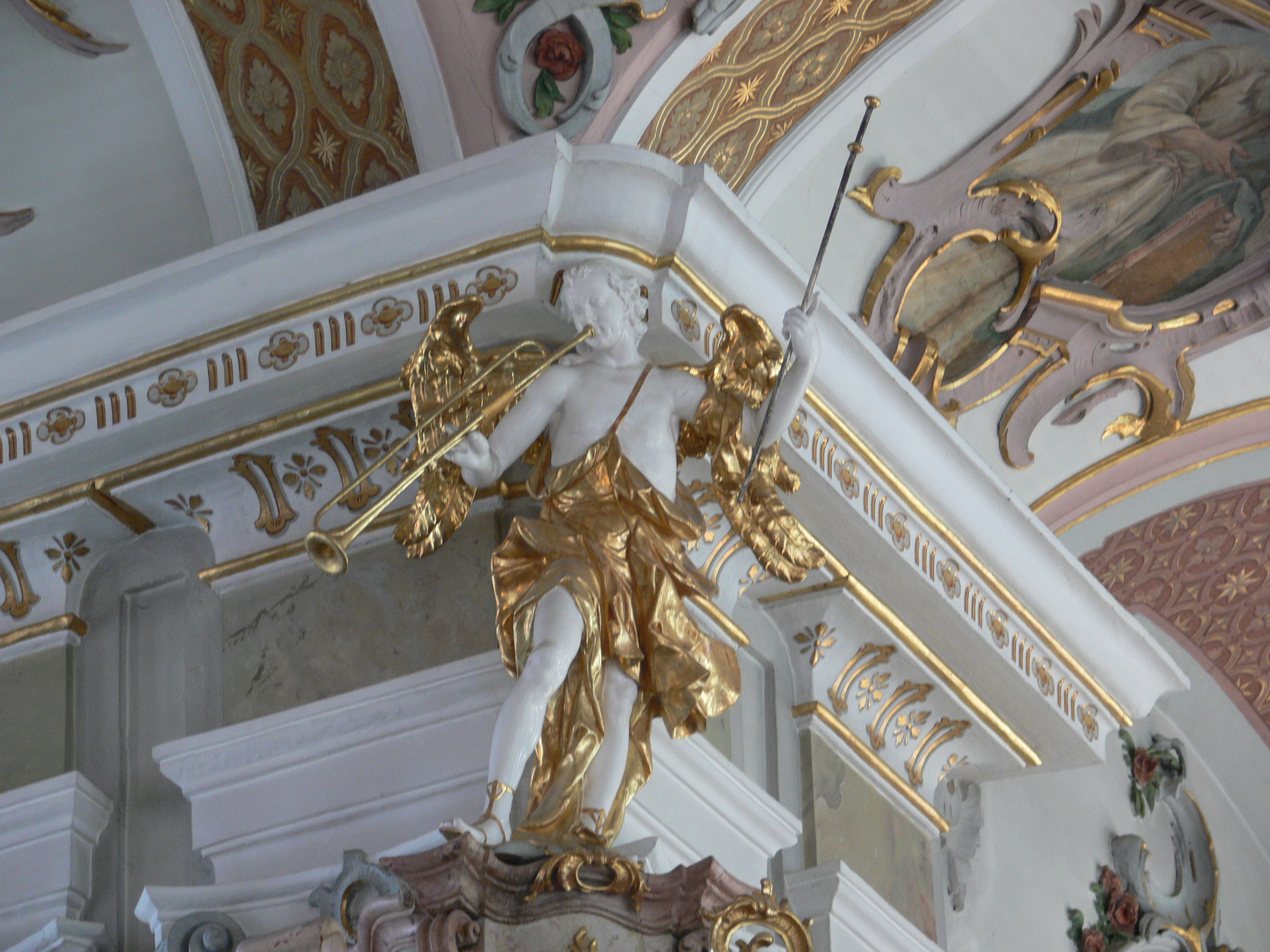 Pfarrkirche St. Pankratius, Wiggensbach: Kanzel von 1772, Engel mit Trompete